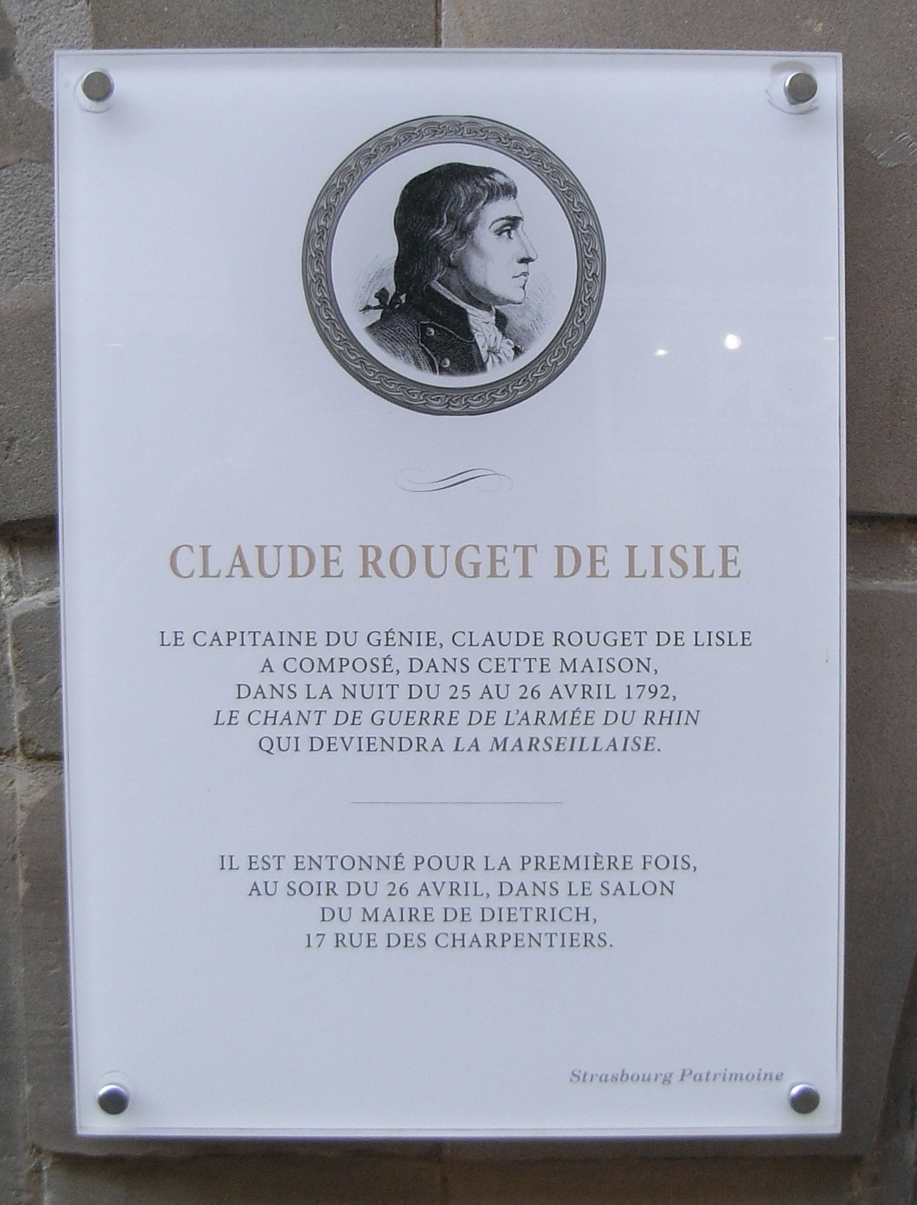 Plaque sur la maison de Claude Joseph Rouget de Lisle au 81 Grand rue à Strasbourg (France)